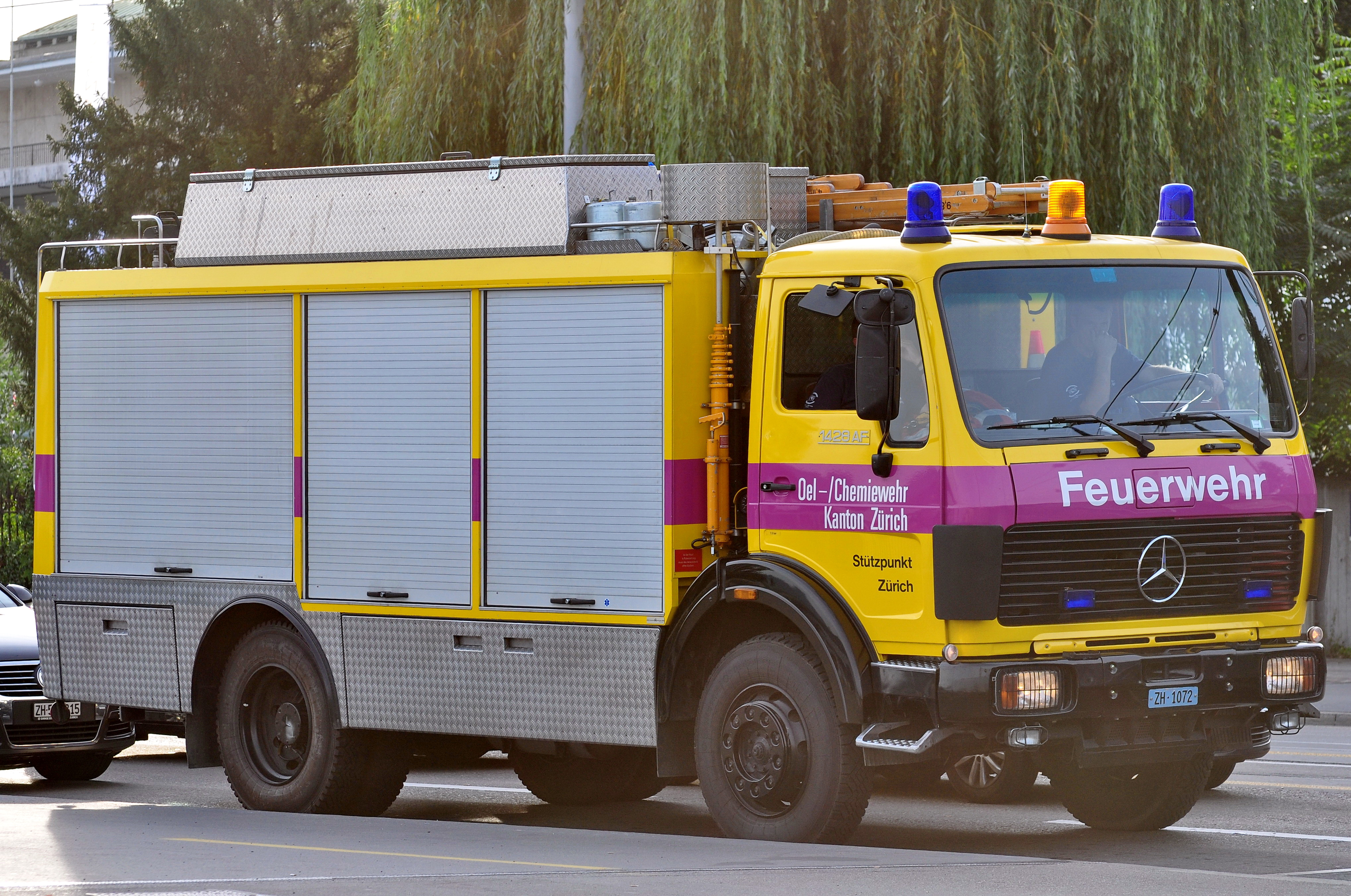 Schutz und Rettung, Bürkliplatz in Zürich (Switzerland)